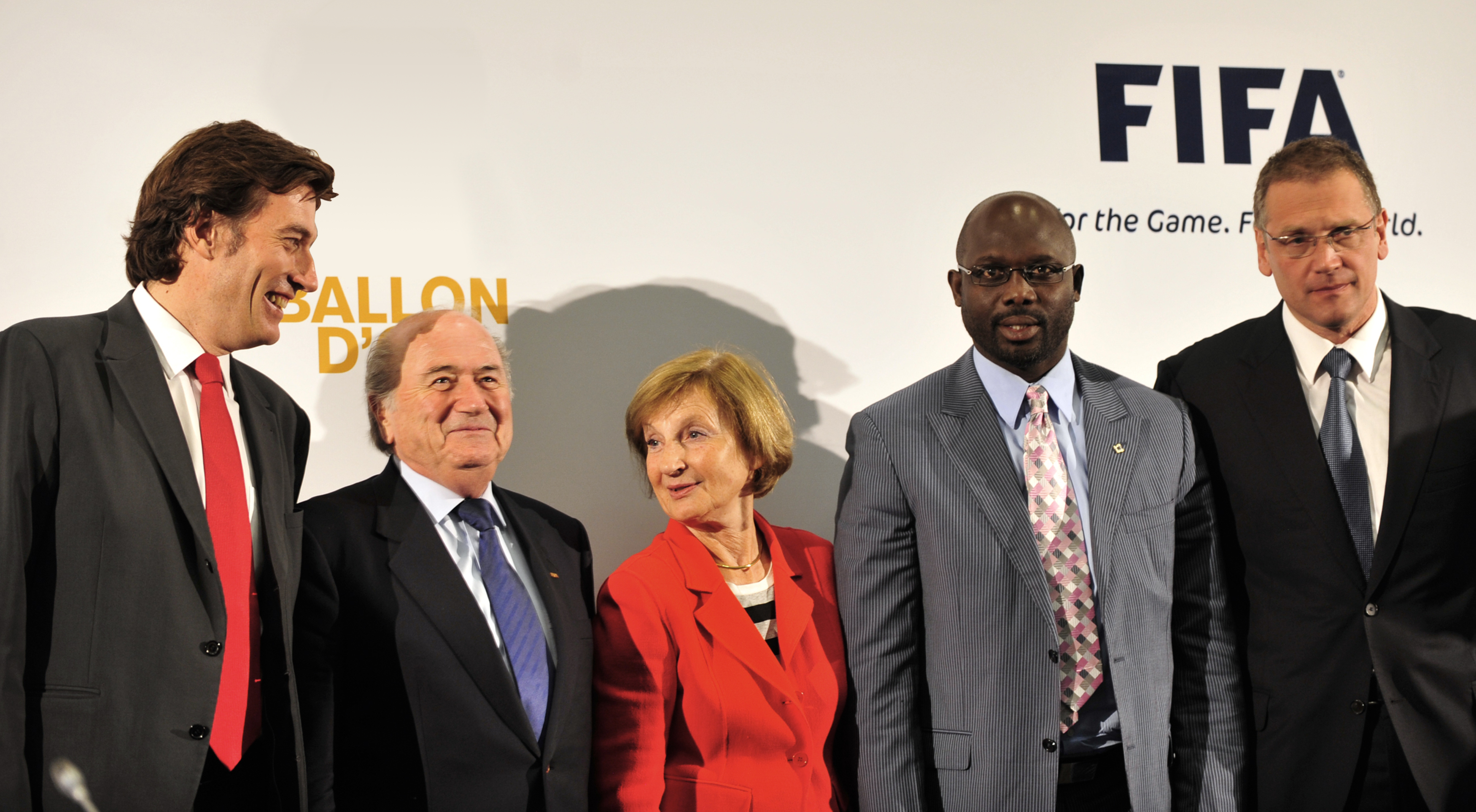 Joanesburgo (África do Sul) - Evento em que Fifa e a revista France Football asssinaram um acordo para unificar os dois principais prêmios concedidos aos melhores jogadores do mundo.